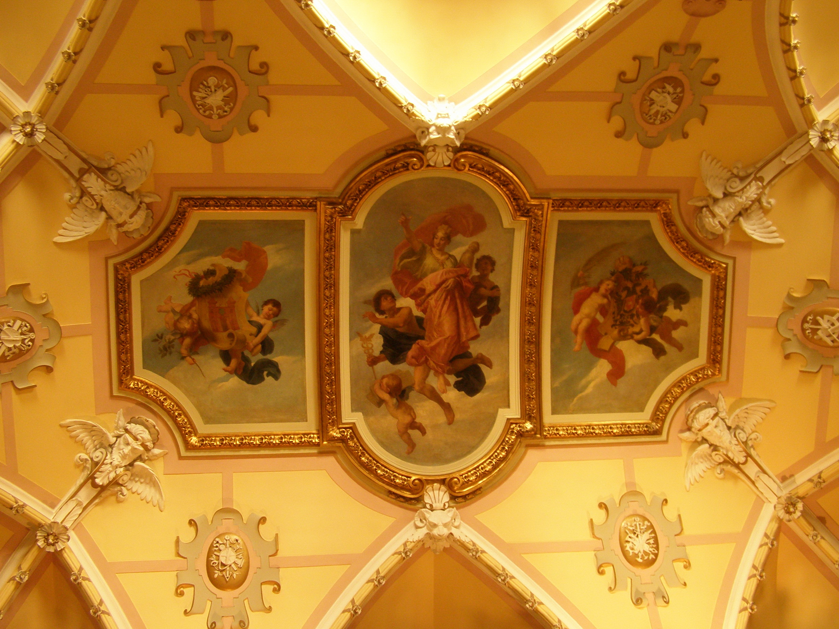 Liberec, radnice, pohled na strop ve vstupní hale